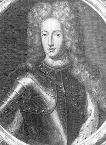 Herzog Friedrich IV. von Holstein Gottorf